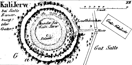 Kaali